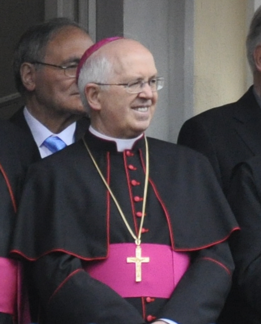 Weingarten, Blutritt 2011, Ehrengäste auf dem Rathausbalkon, Julián Barrio Barrio (Erzbischof von Santiago de Compostela)